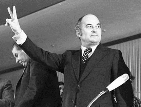 Großkundgebung der CDU zur Bundestagswahl in Köln, Messehalle (Rainer Barzel (Siegerpose))